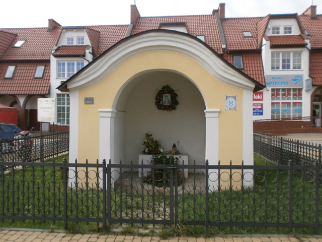 Krzeszów, kaplica kalwarii